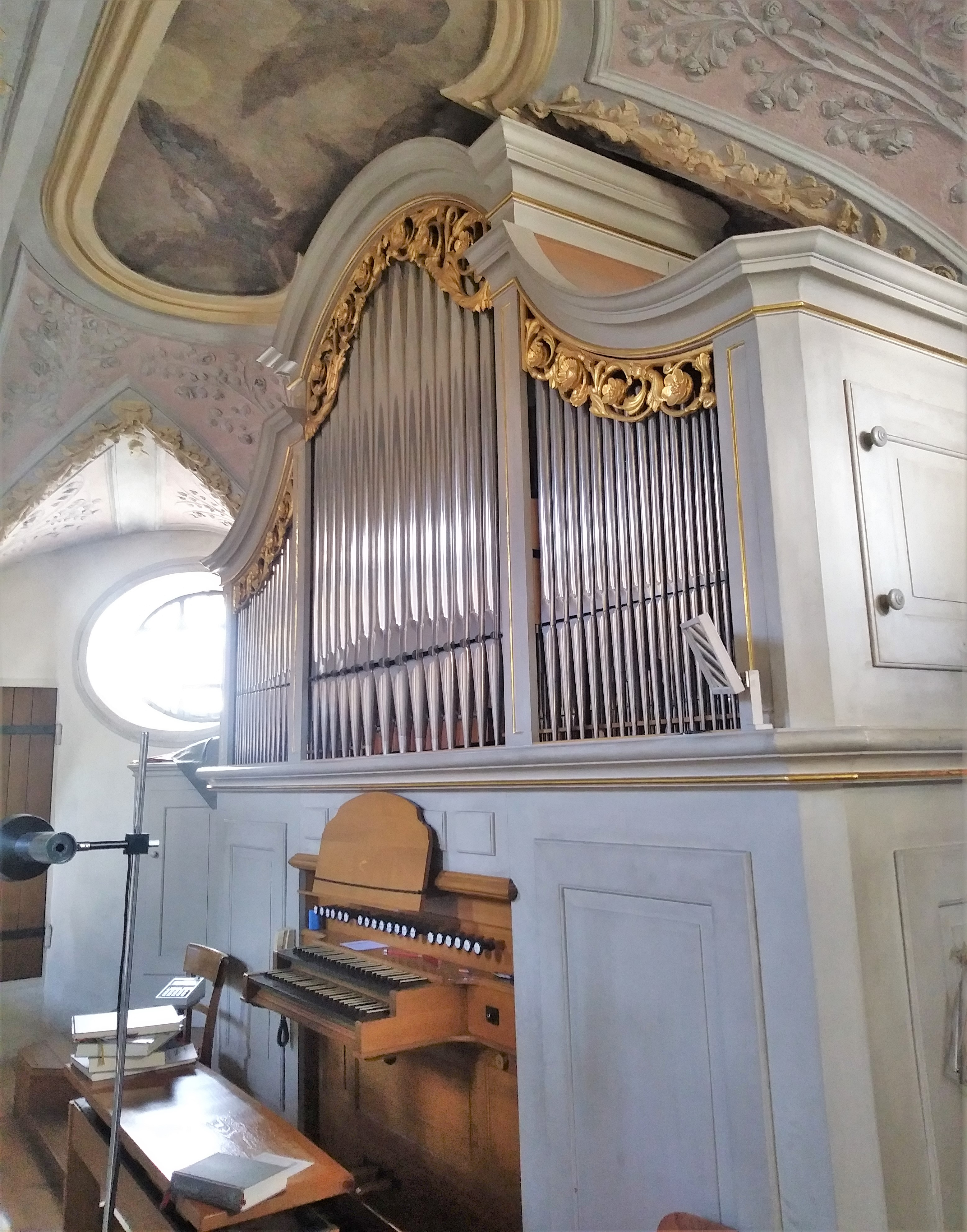 Winterhalter-Orgel der Dreifaltigkeitskirche München